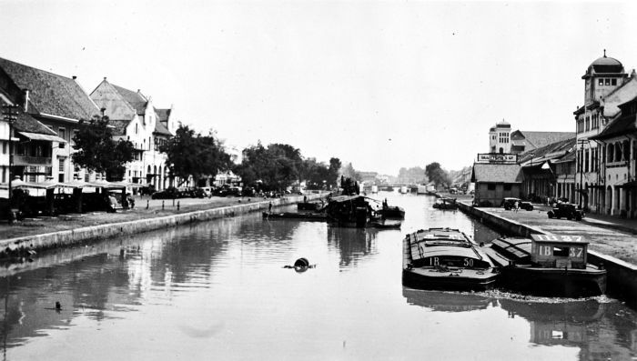 Repronegatief. Kali Baroe, Djakarta, West Java